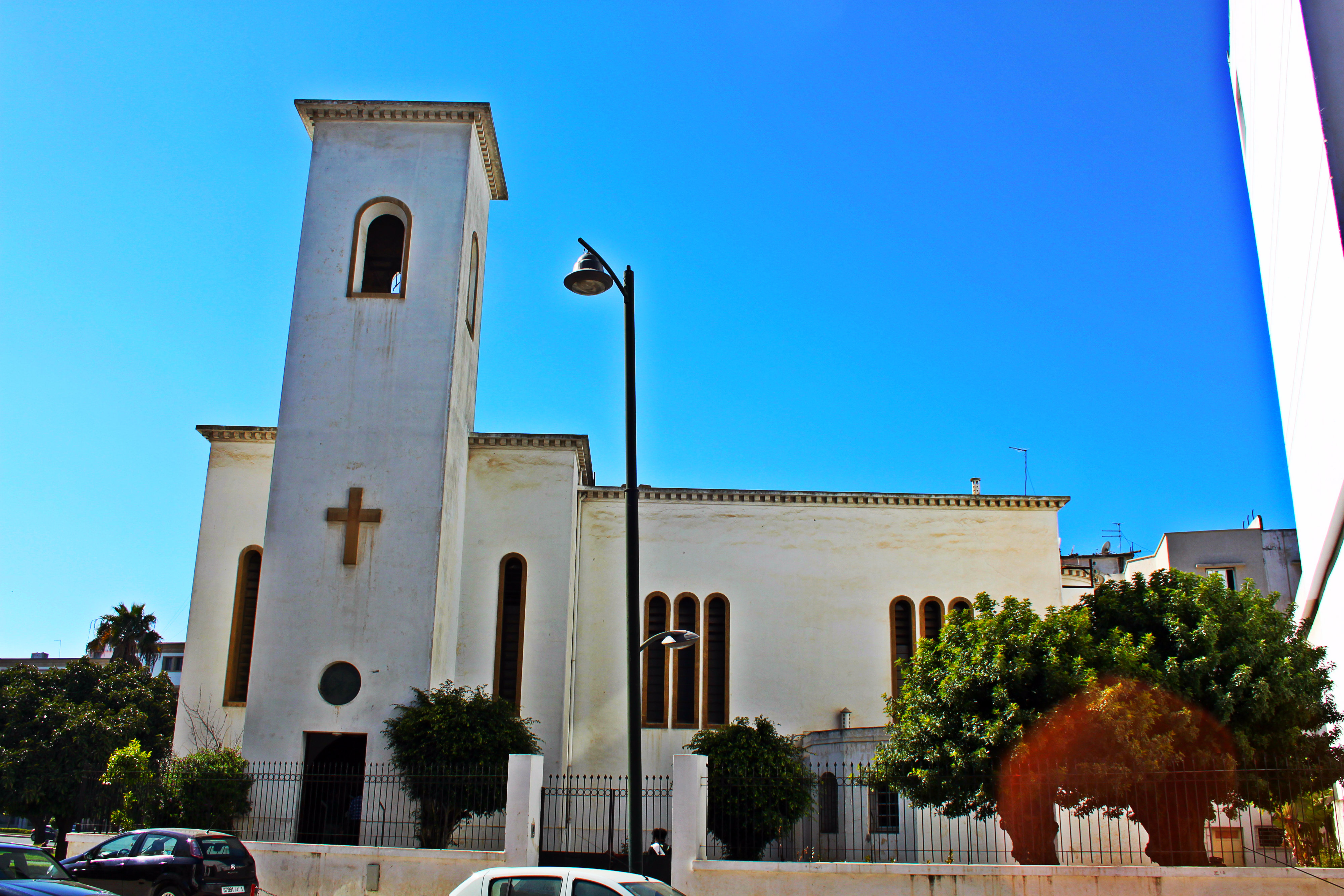 Church-Rabat